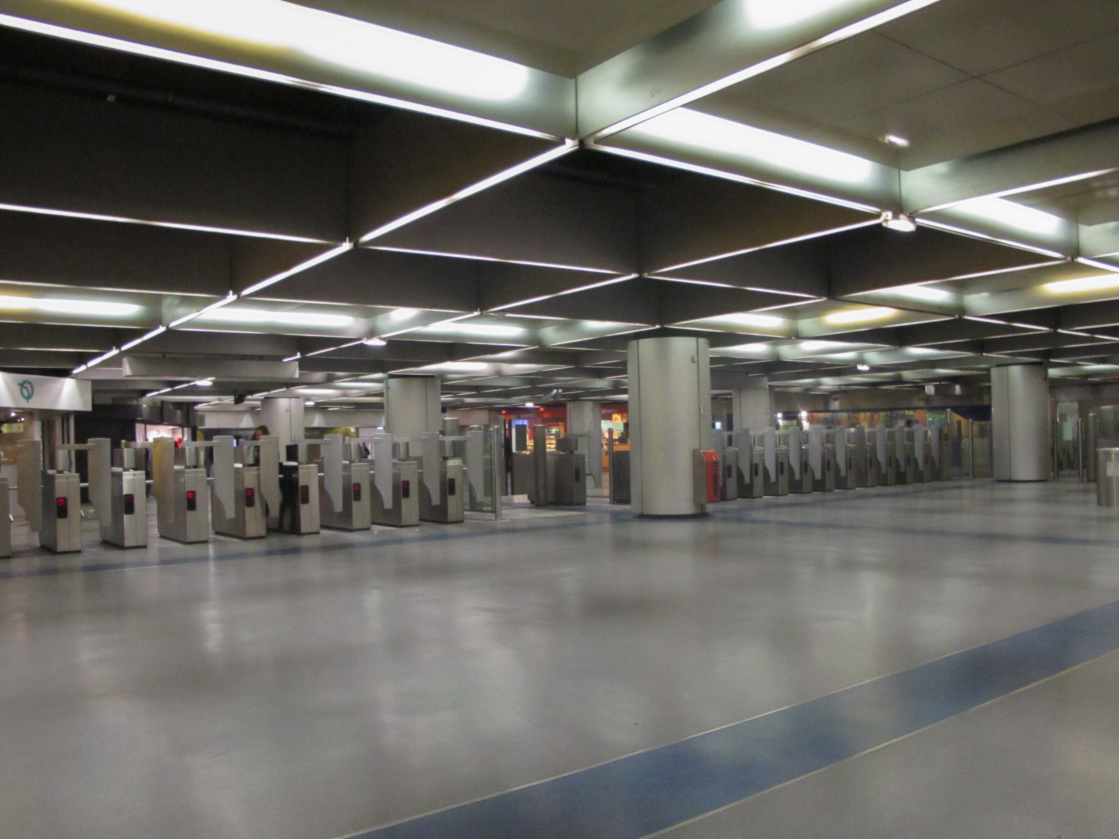 Gare de Nation - Ligne A du RER (Paris / France)